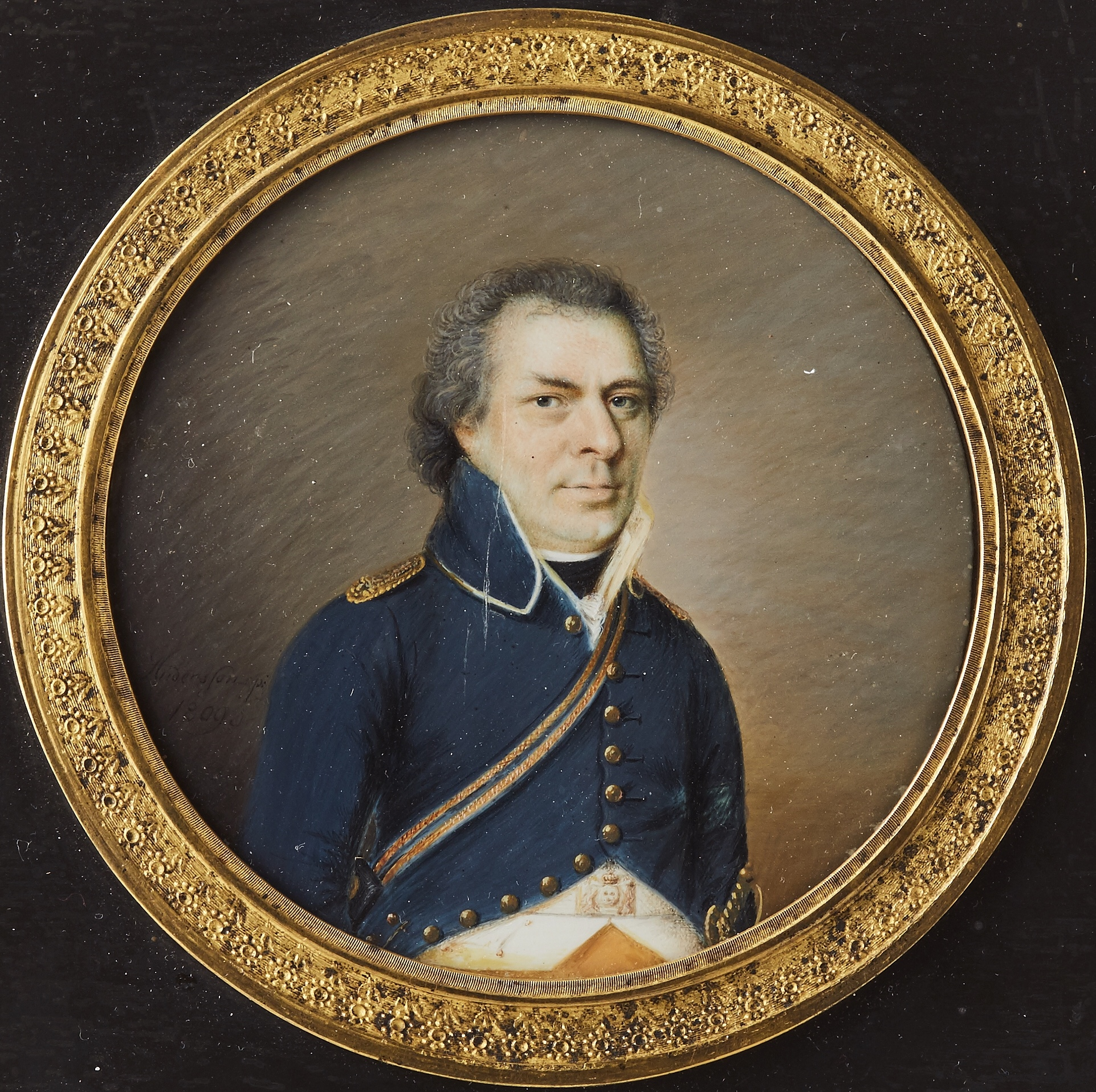 Porträtt av Johannes Gerle (1745-1818) sadelmakare och ålderman i sadelmakarskrået i Stockholm. Iklädd uniform m/1802 för en kornett vid Stockholms borgerskaps militärkårers kavalleri. Avporträtterad 1809 av Anders Gustaf Andersson.